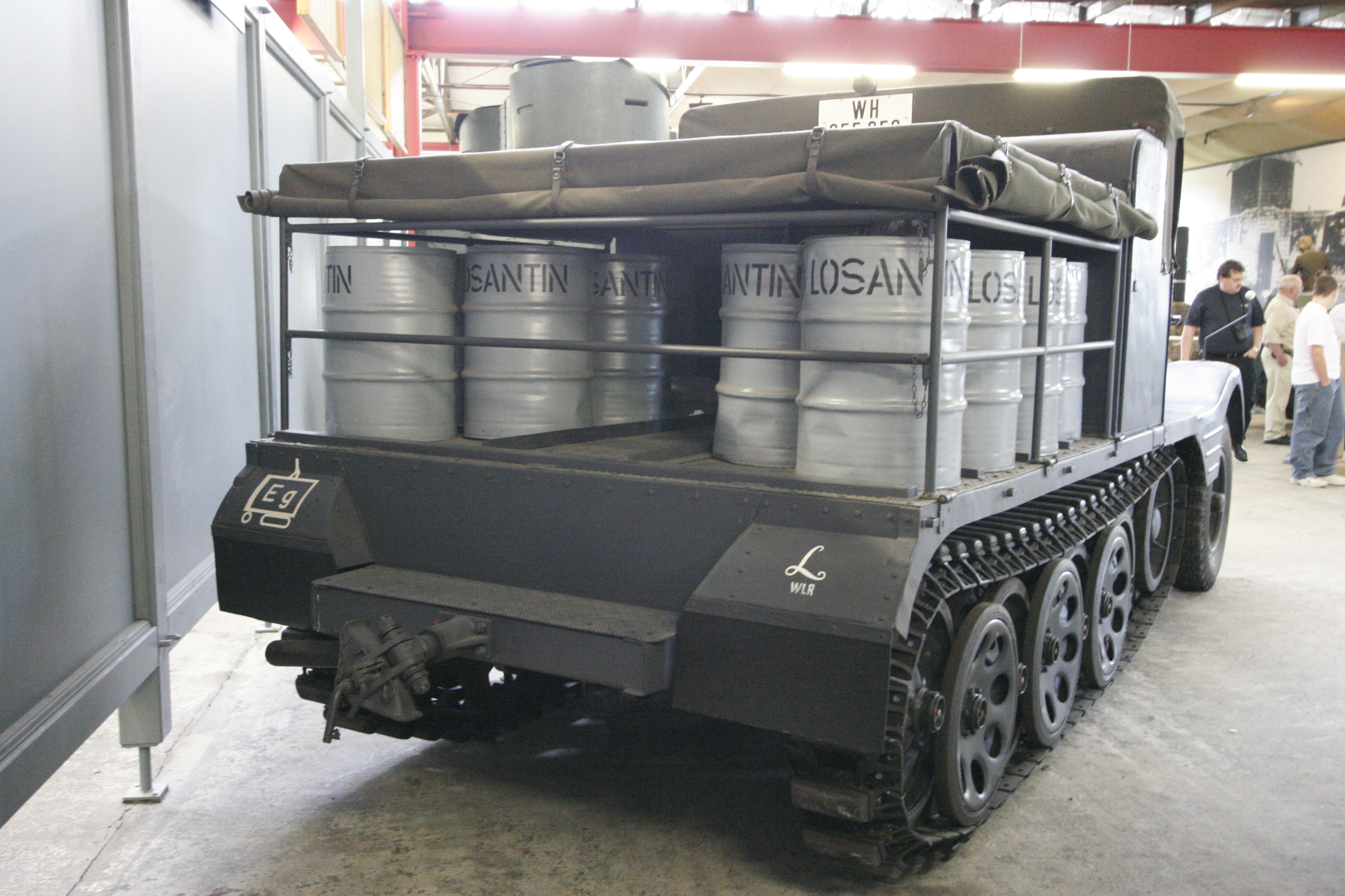 Mittlerer Entgiftungswagen (Sd.Kfz. 11/2), Hersteller: Borgward / Back on display at the Deutsches Panzermuseum Munster , Germany.